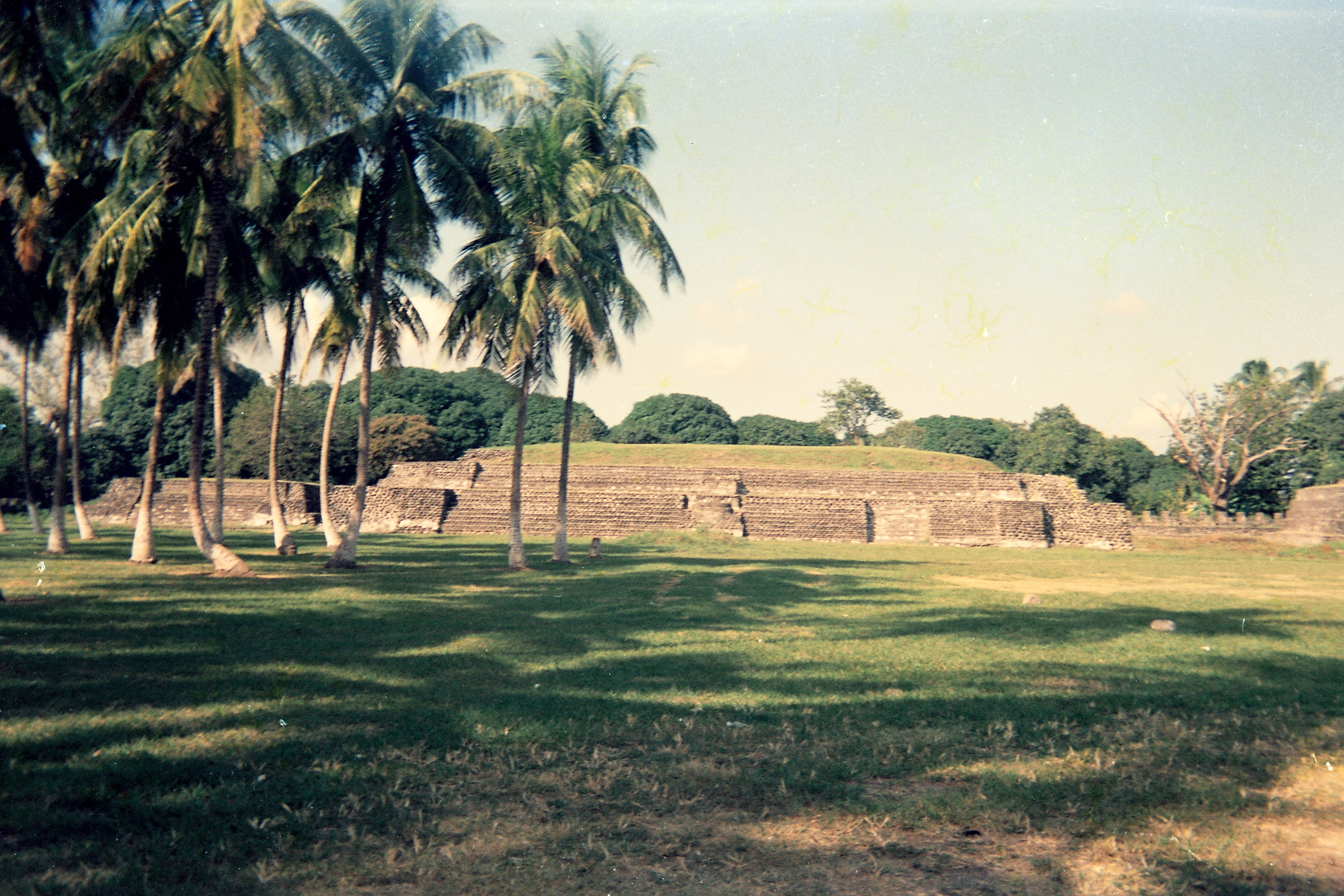 Photo taken in Cempoala, State of Veracruz, Mexico. IMPROVED: This is a digitalize picture from and old picture. Picture should be improved when posible. NOTE: Photo nead to be describe. SPANISH: Foto tomada en Cempoala, Estado de Veracruz, México. MEJORA: Esta imagen se ha digitalizado a partir de un negativo viejo, la foto debe ser mejorada cuando sea posible. SPANISH: Foto tomada en de Oaxaca, México.